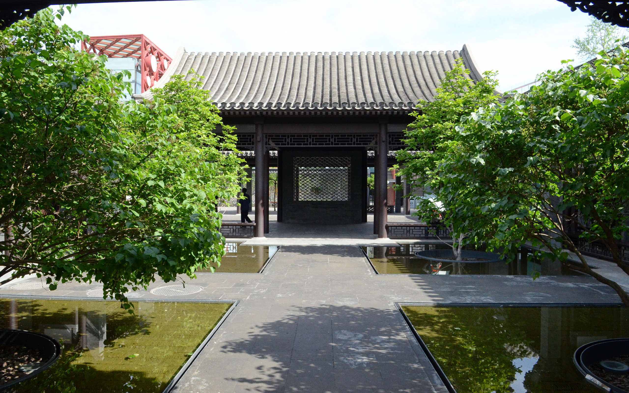 中文（中国大陆）: 位于北京奥林匹克公园中部奥林匹克公园下沉花园的2号院“古木花厅”